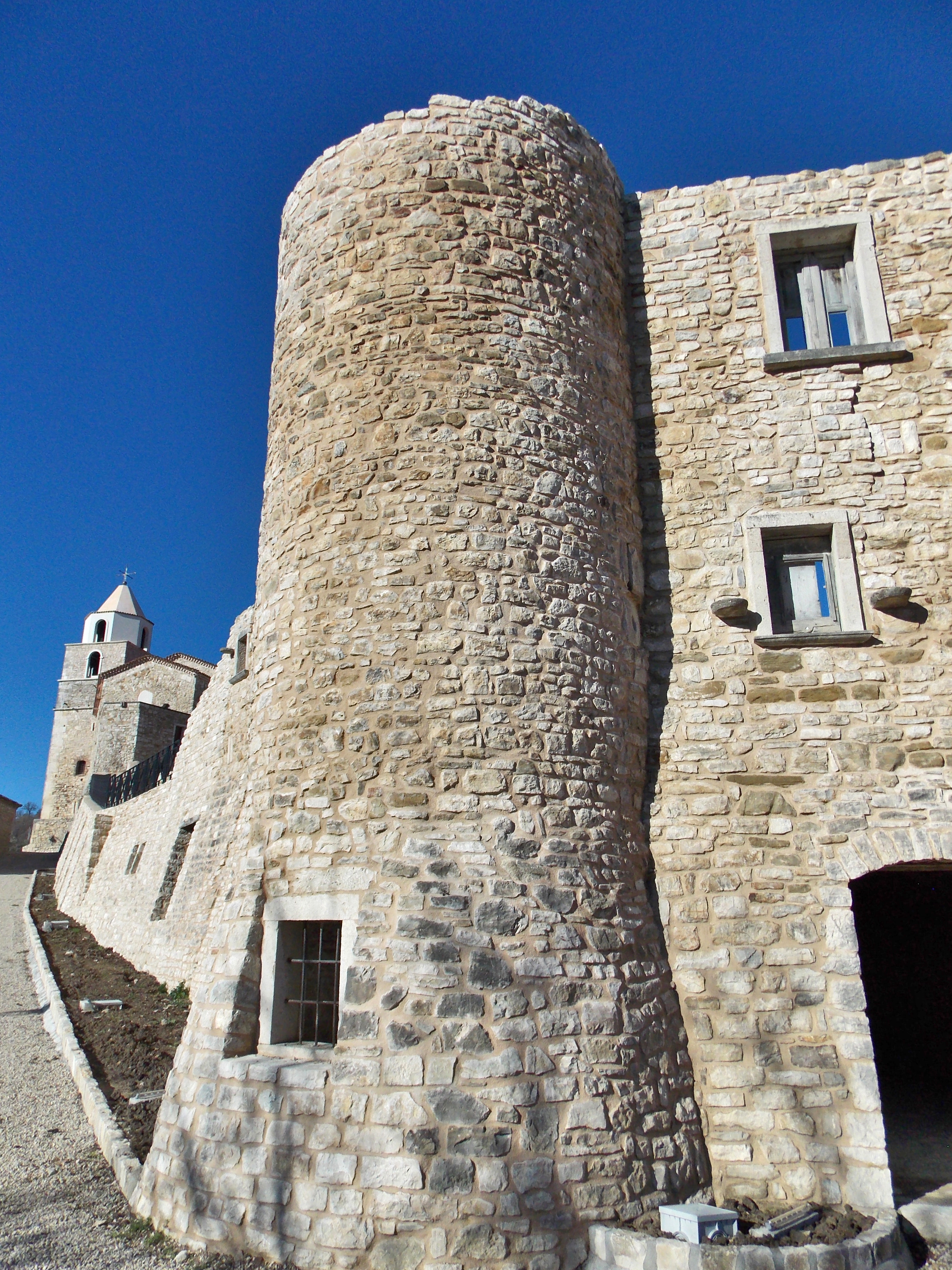 Il Rione Terra di Molinara (BN)